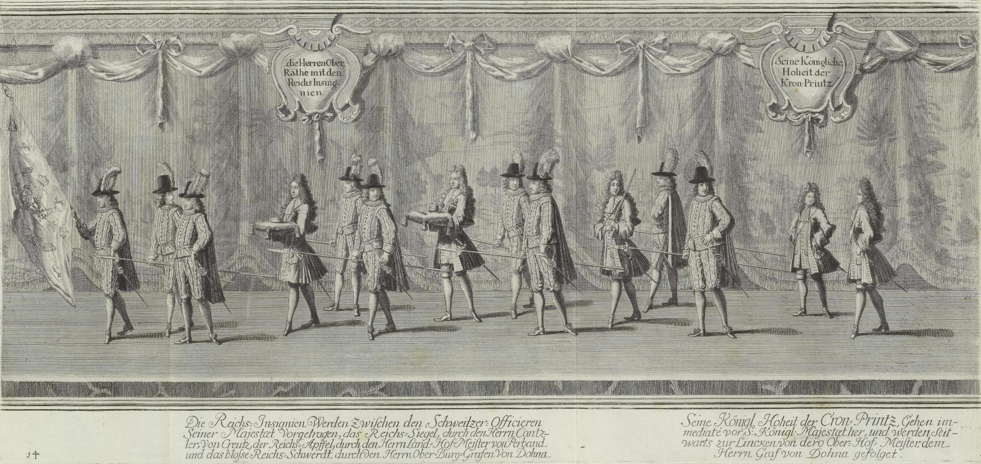 Der Königlich-Preüßischen Crönung Hochfeÿerliche Solemnitäten, Blatt 14 die Herren Ober-Räthe mit den ReichInsingnien Seine Königliche Hoheit der Kron-Printz Die Reichs-Insignien Werden Zwischen den Schweitzer-Officieren Seiner Majestæt Vorgetragen, das Reichs-Siegel, durch den Herrn Cantzler, Von Creutz, der Reichs-Apffel, durch den Herrn Land-Hof-Meister von von Perband, und das blosse Reichs-Schwerdt, durch den Herrn Ober-Burg-Grafen Von Dohna Seine Königl. Hoheit der Cron-Printz, Gehen immediate vor S. Königl. Majestæt her, und werden seitwarts zur Lincken von dero Ober-Hof-Meister, dem Herrn Graf von Dohna gefolget